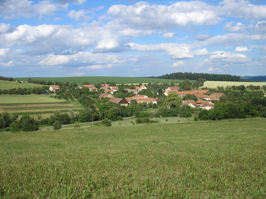 Pohled na Zhoř